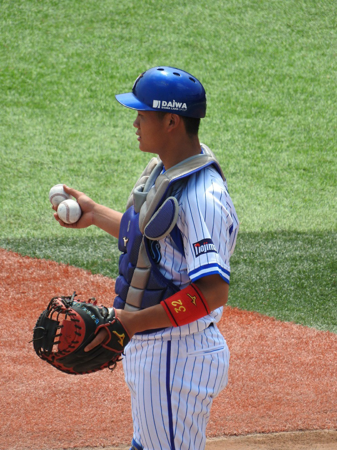 2019年5月2日横須賀スタジアムにて